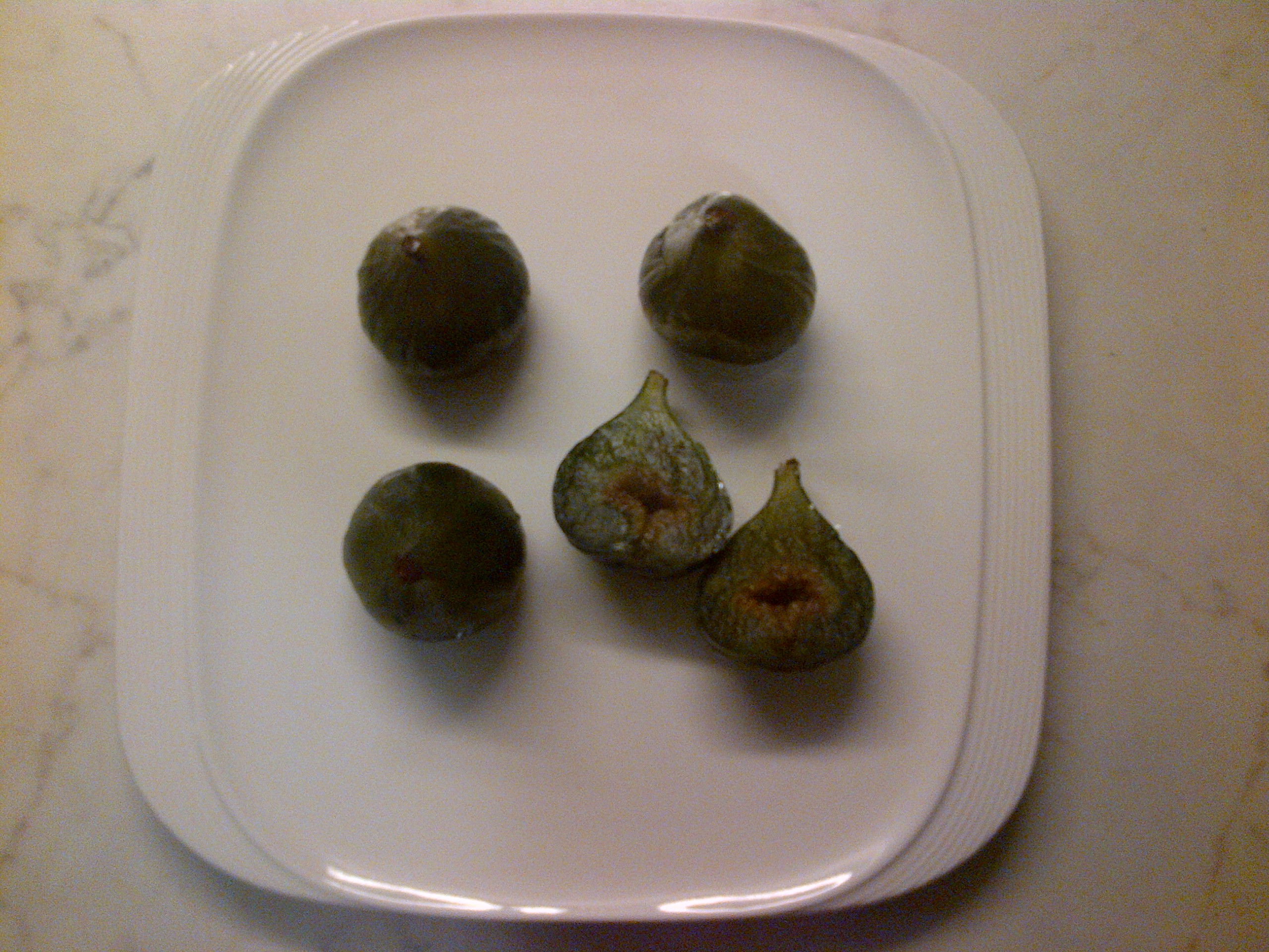 Dulce de higos, es un postre turco hecho con higos (brevas) frescas. Es diferente al "postre de higos" que se hace con brevas secas.